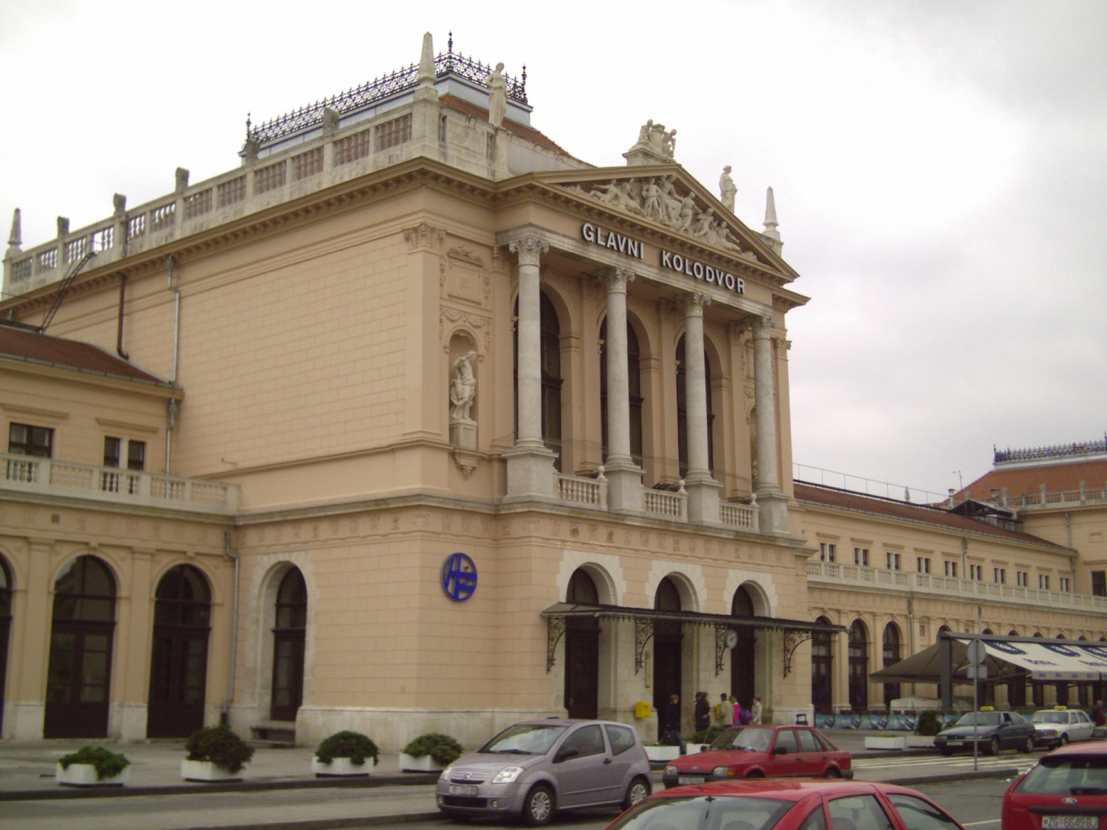 Zagreb, Glavni kolodvor - Main Station